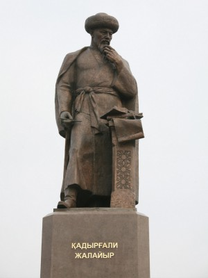 Кадыргали Жалаири